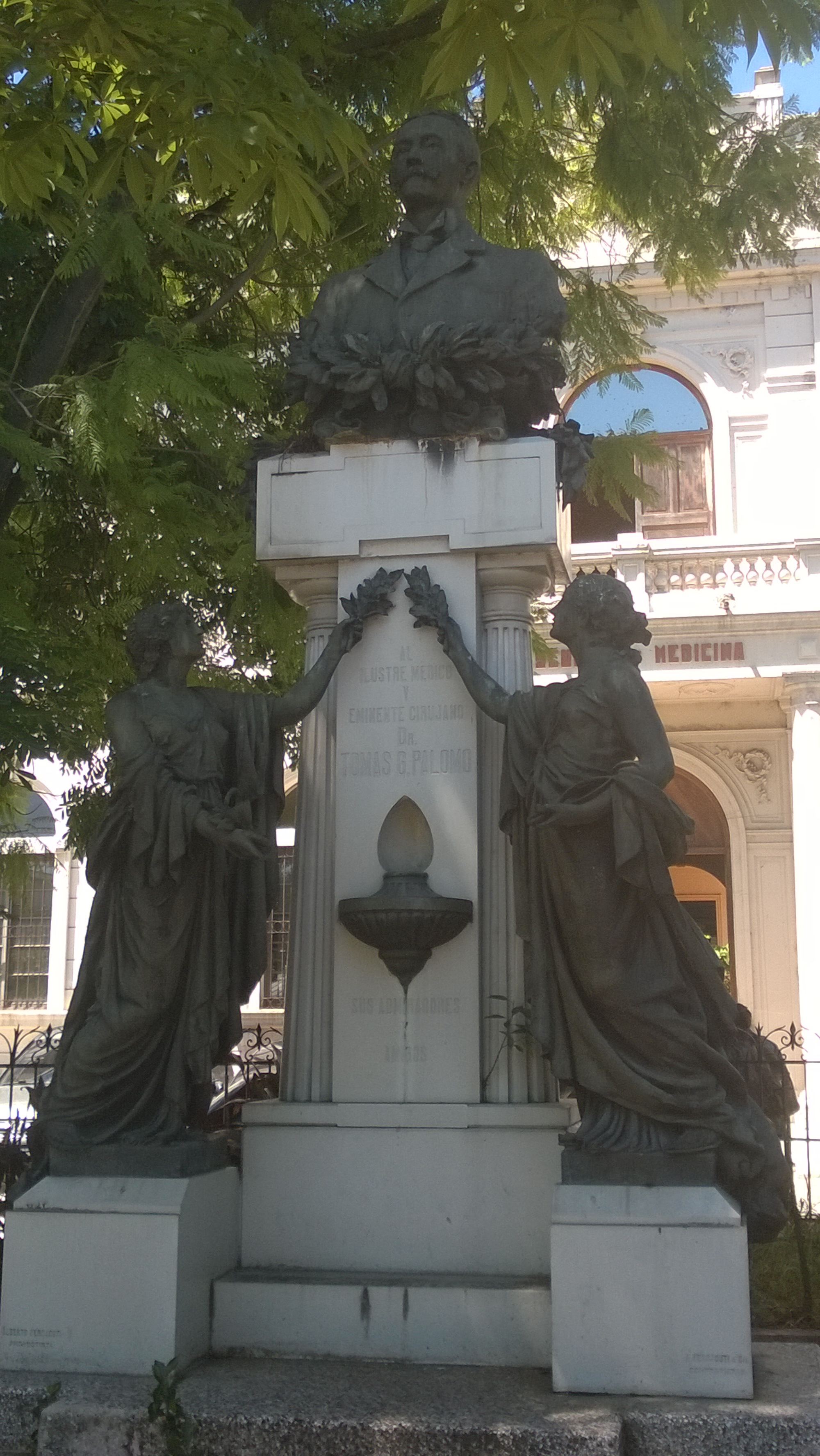 Estatua del cirujano Dr. Tomás G. Palomo en el edificio de La Rotonda, frente al hospital Rosales, San Salvador.